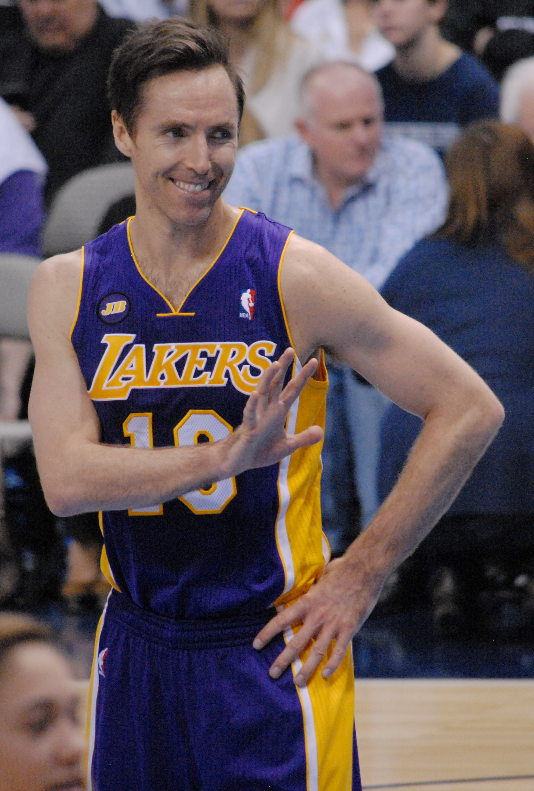 basketball,nba,2/24/2013 steve nash